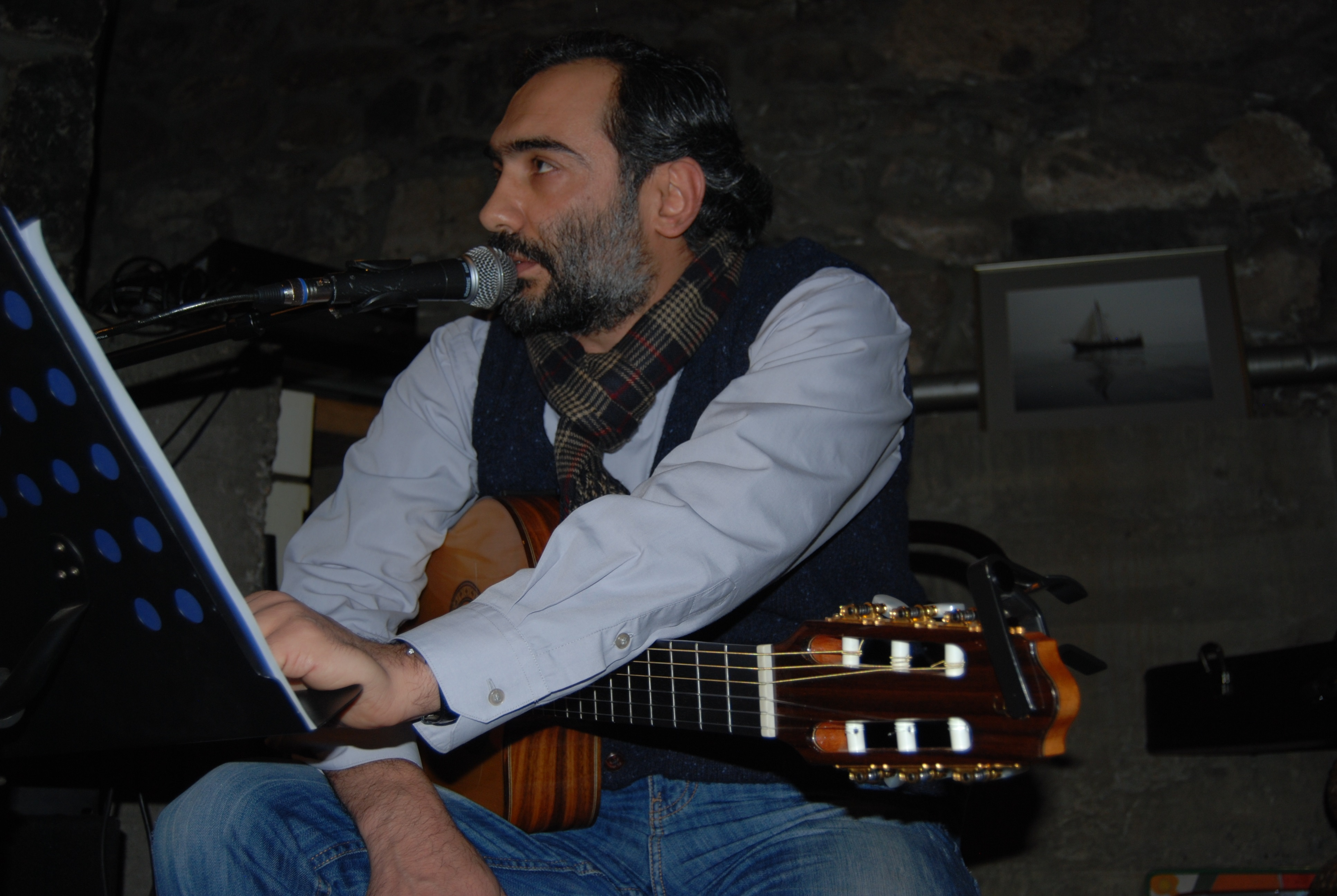 Բարդ ակումբում